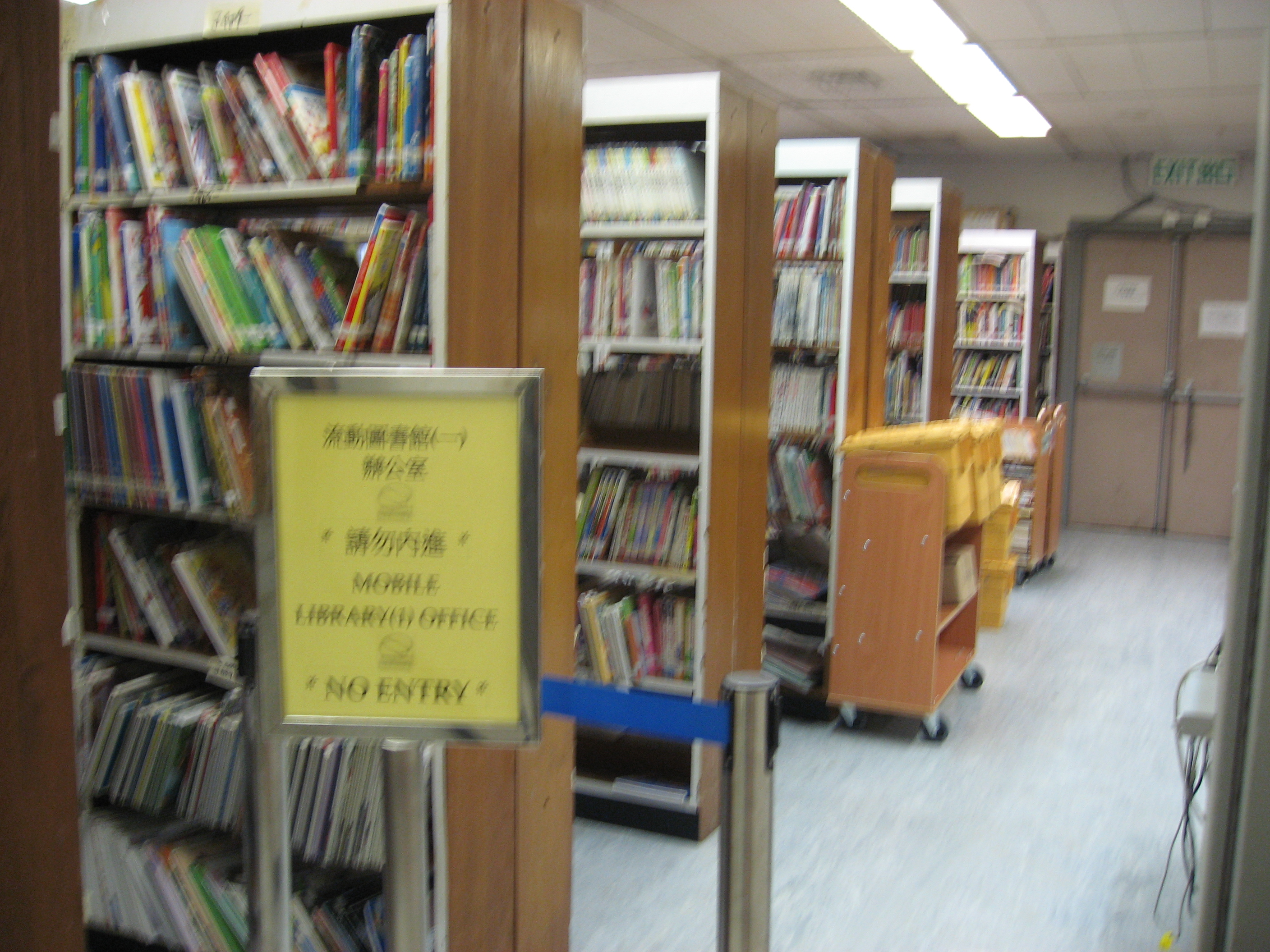 荃灣公共圖書館7樓流動圖書館辦事處